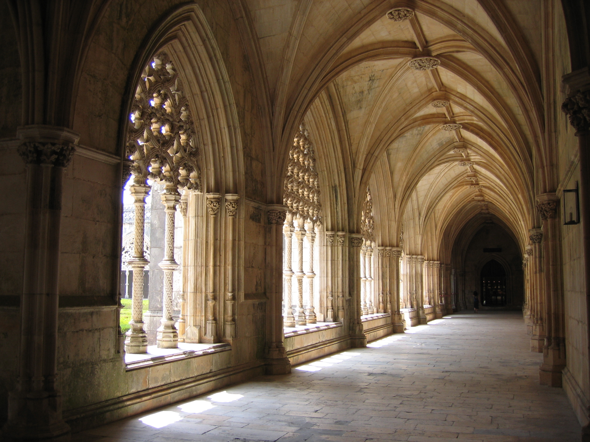 Mosteiro da Batalha (Cloister) - Portugal Author: Raph Date: 6 August 2005